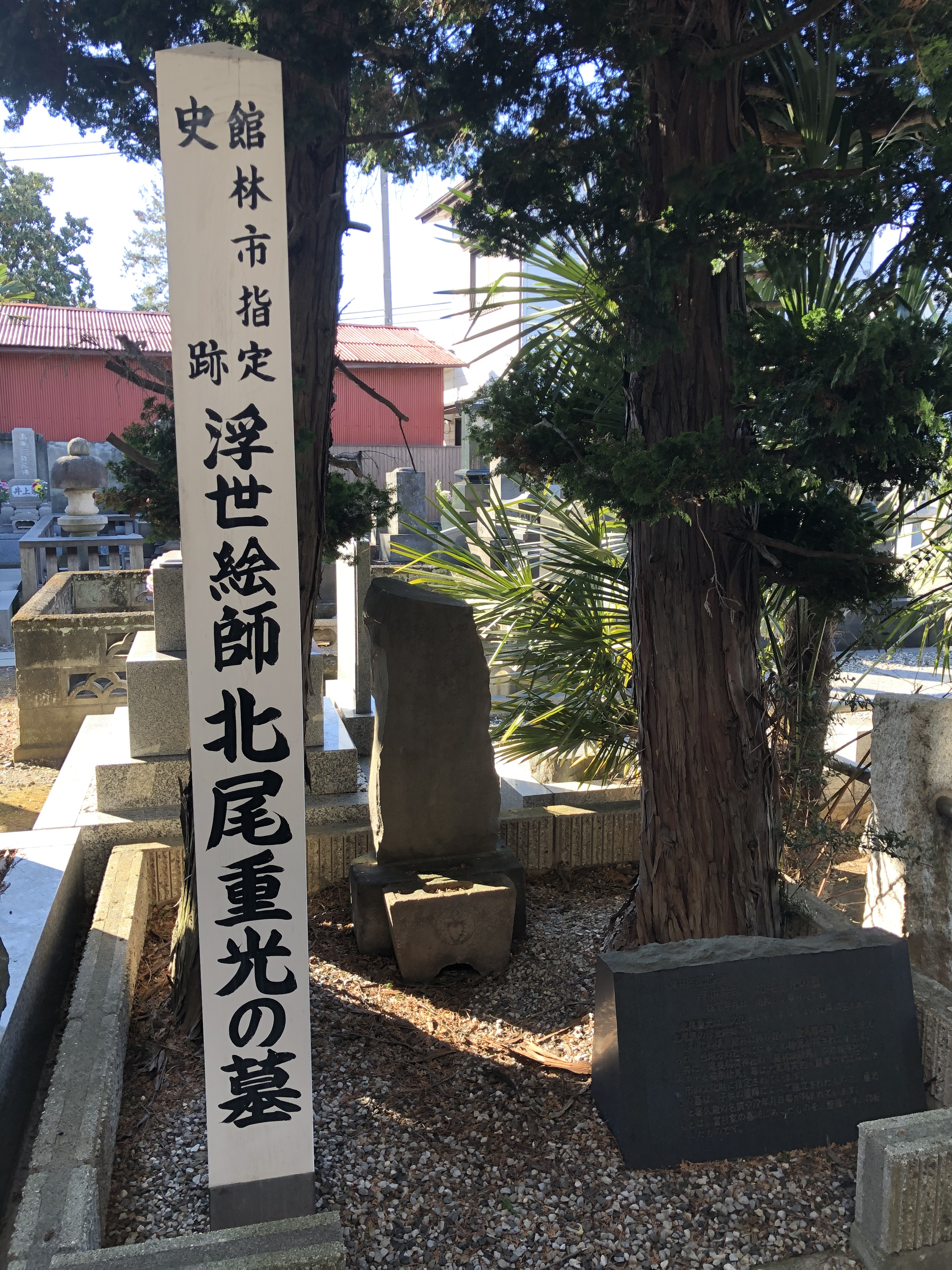 館林覚応寺 北尾重光の墓